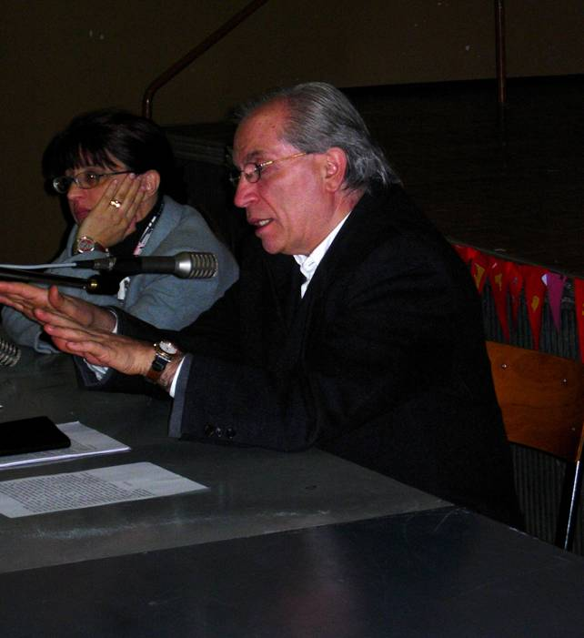 Ermis Segatti, Torino